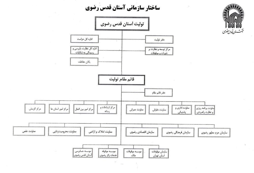 آستان قدس رضوی